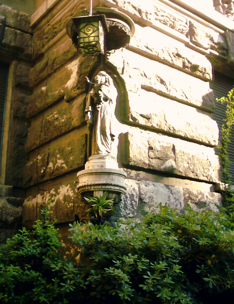 Madonna con Bambino - Quartiere Coppedè